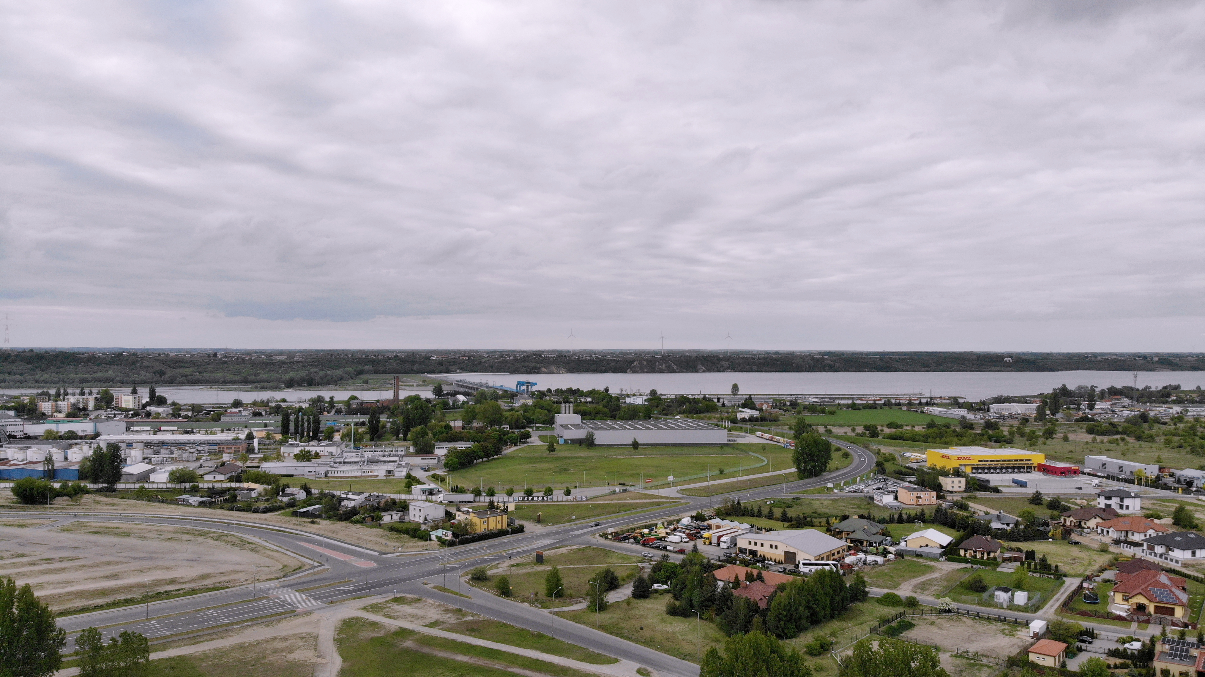 Kazimierza Wielkiego (2020 r.)